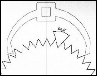 Dibuix sobre l'escapament Català mostrant les dents de la roda i una possible àncora.